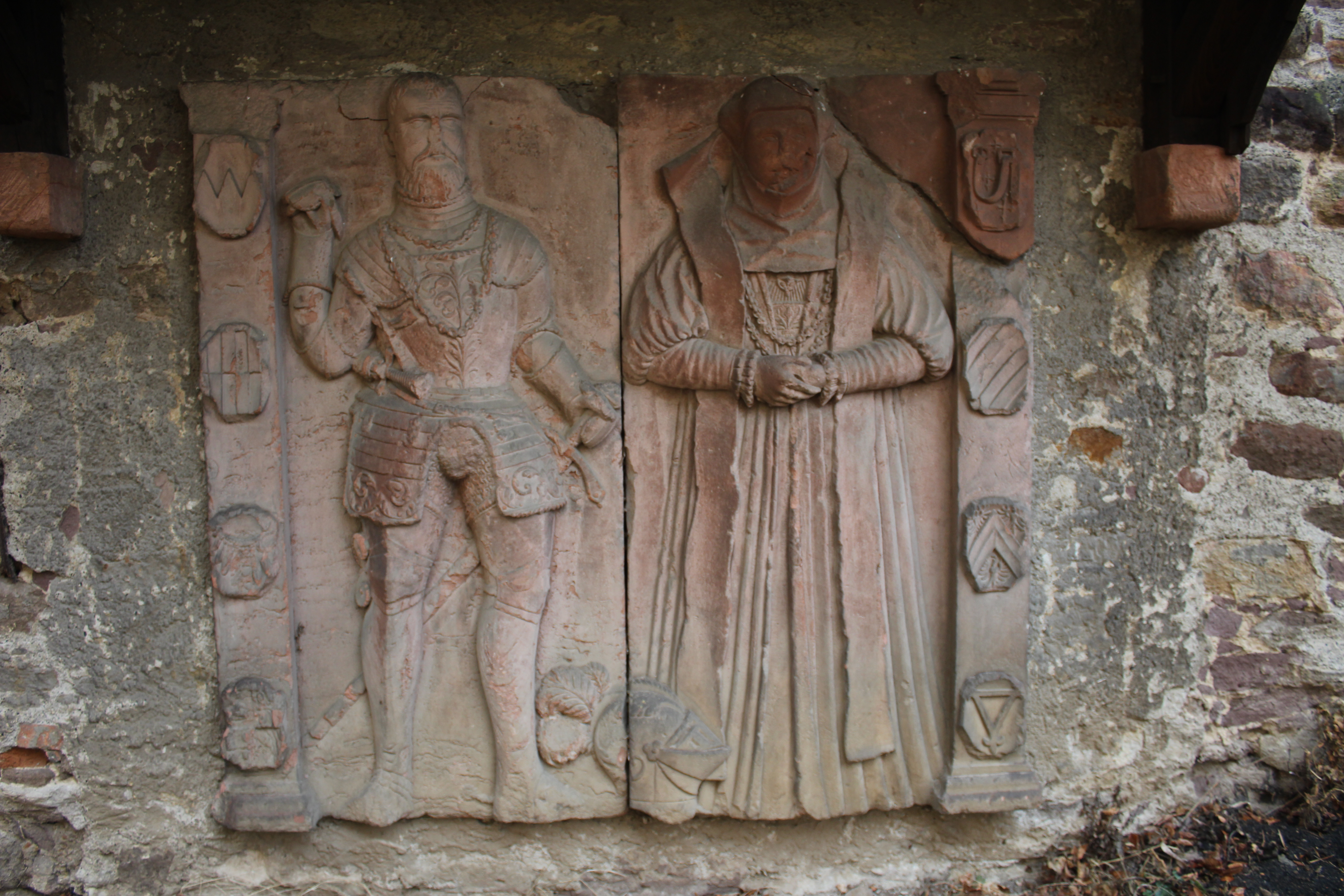 Kath. Kirche Mariä Verkündigung, Heldenbergen, Nidderau, Main-Kinzig-Kreis, Hessen, Deutschland